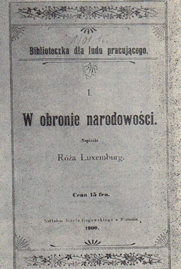 Róża Luksemburg - W obronie narodowości, Poznań 1900r.